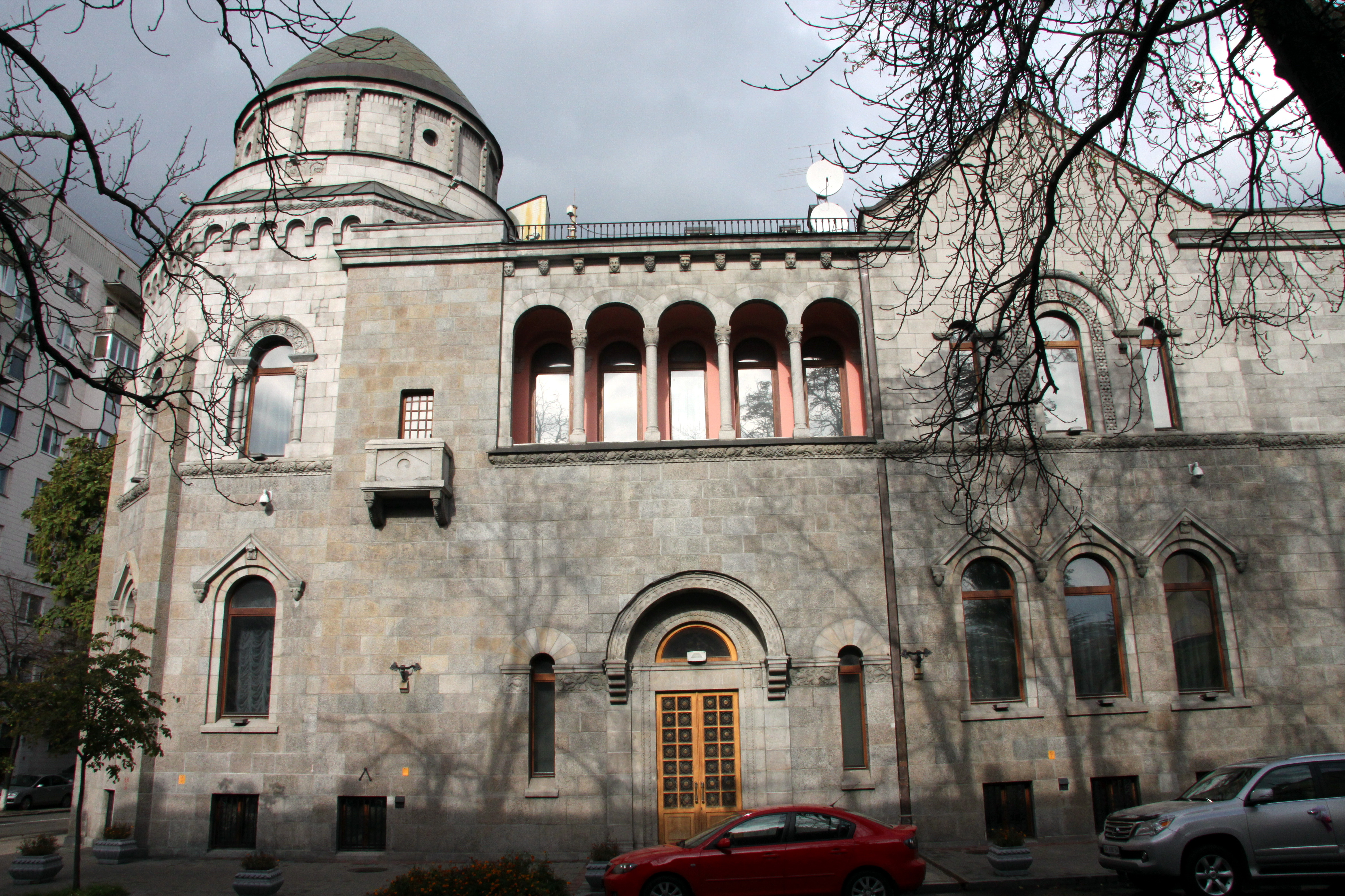 Особняк Ковалевського, Київ, Орлика Пилипа вул., 1/15